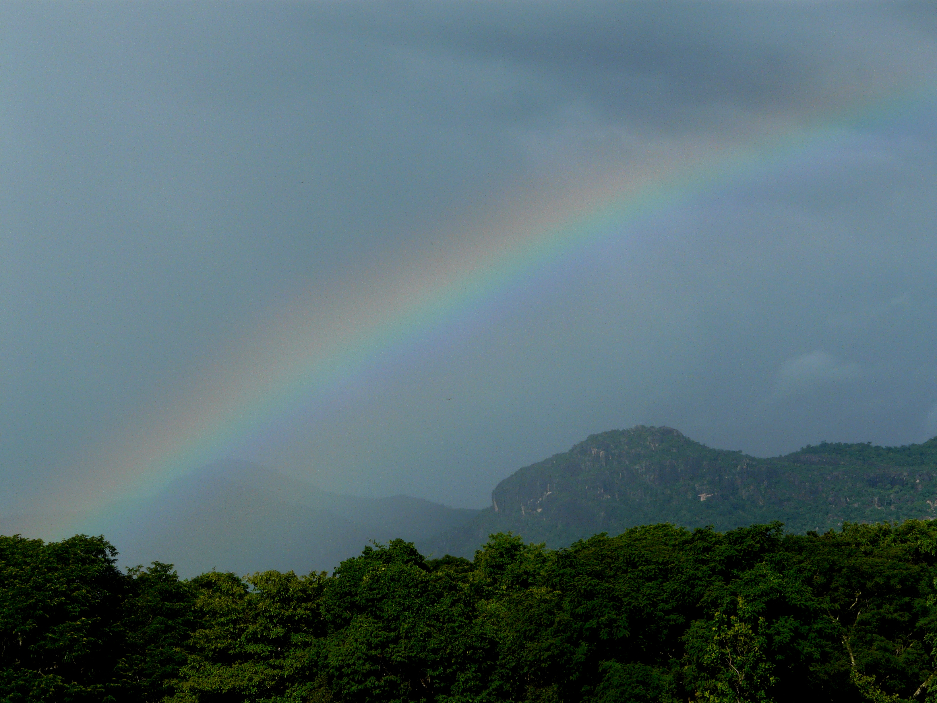 Arcoiris sobre el cerro del Gran Chiwiri